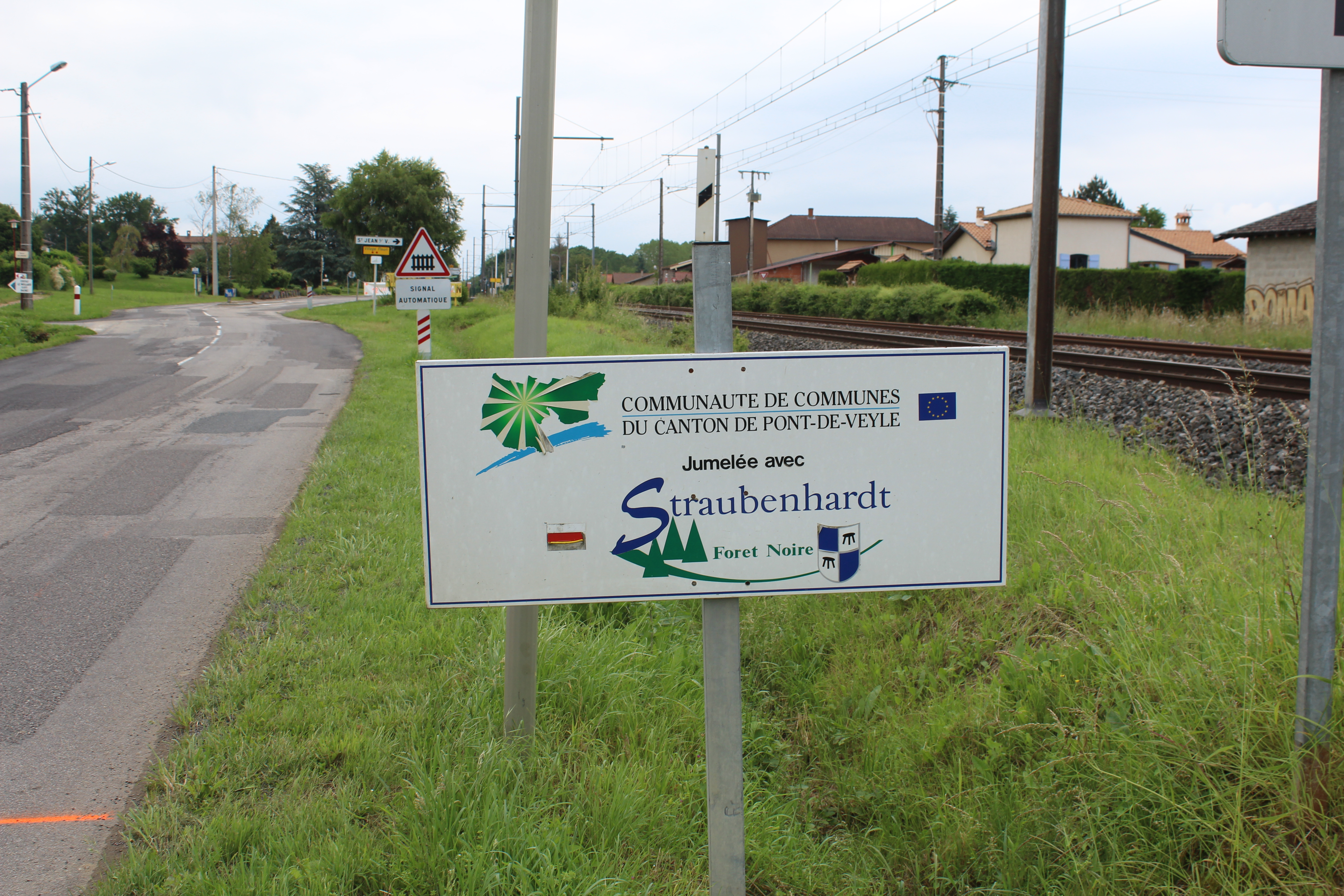 Panneau de jumelage entre le canton de Pont-de-Veyle et Straubenhardt à Saint-Jean-sur-Veyle.